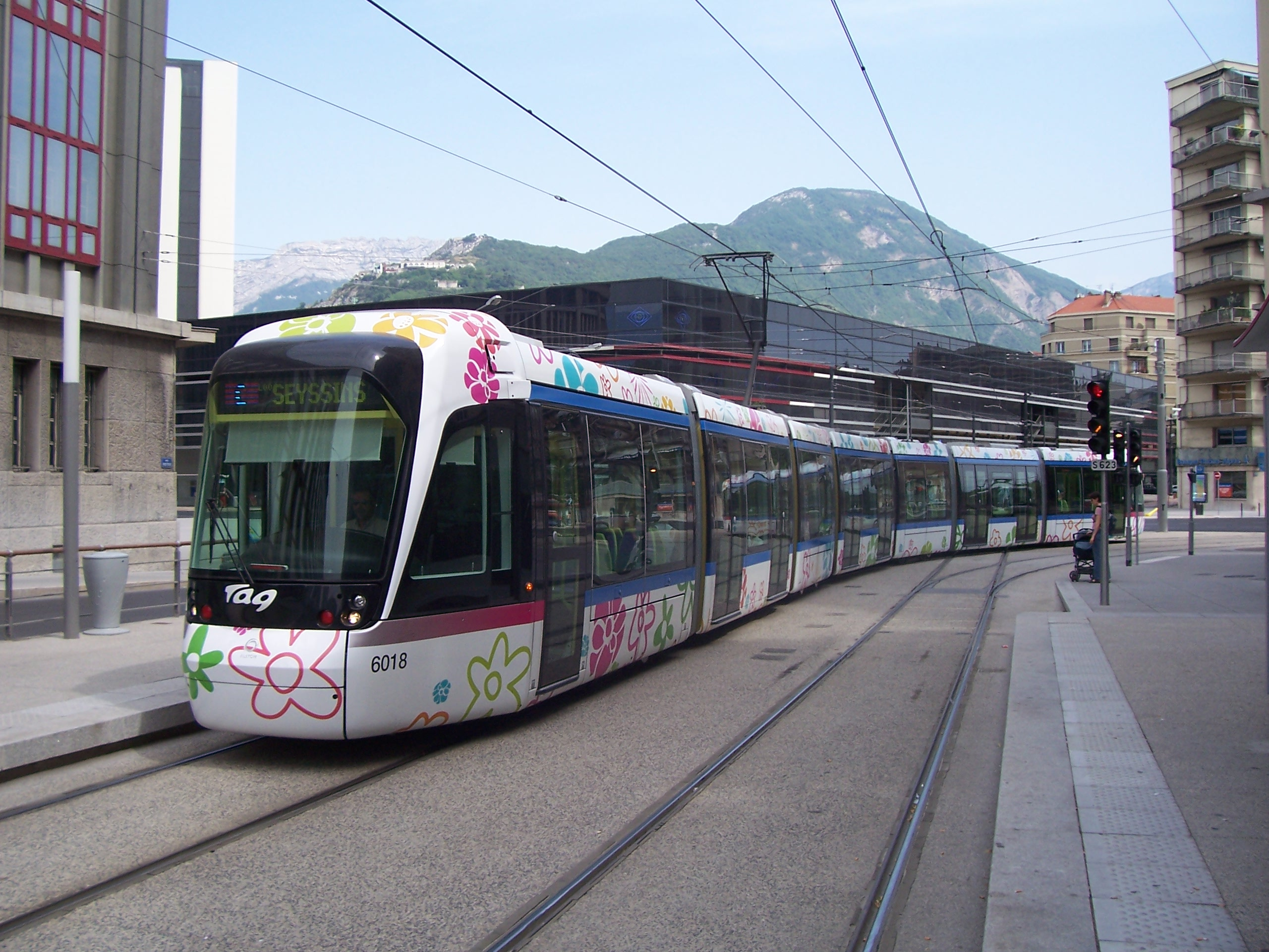 Rame inaugurale ligne C à la station Chavant du réseau urbain de Grenoble (France).